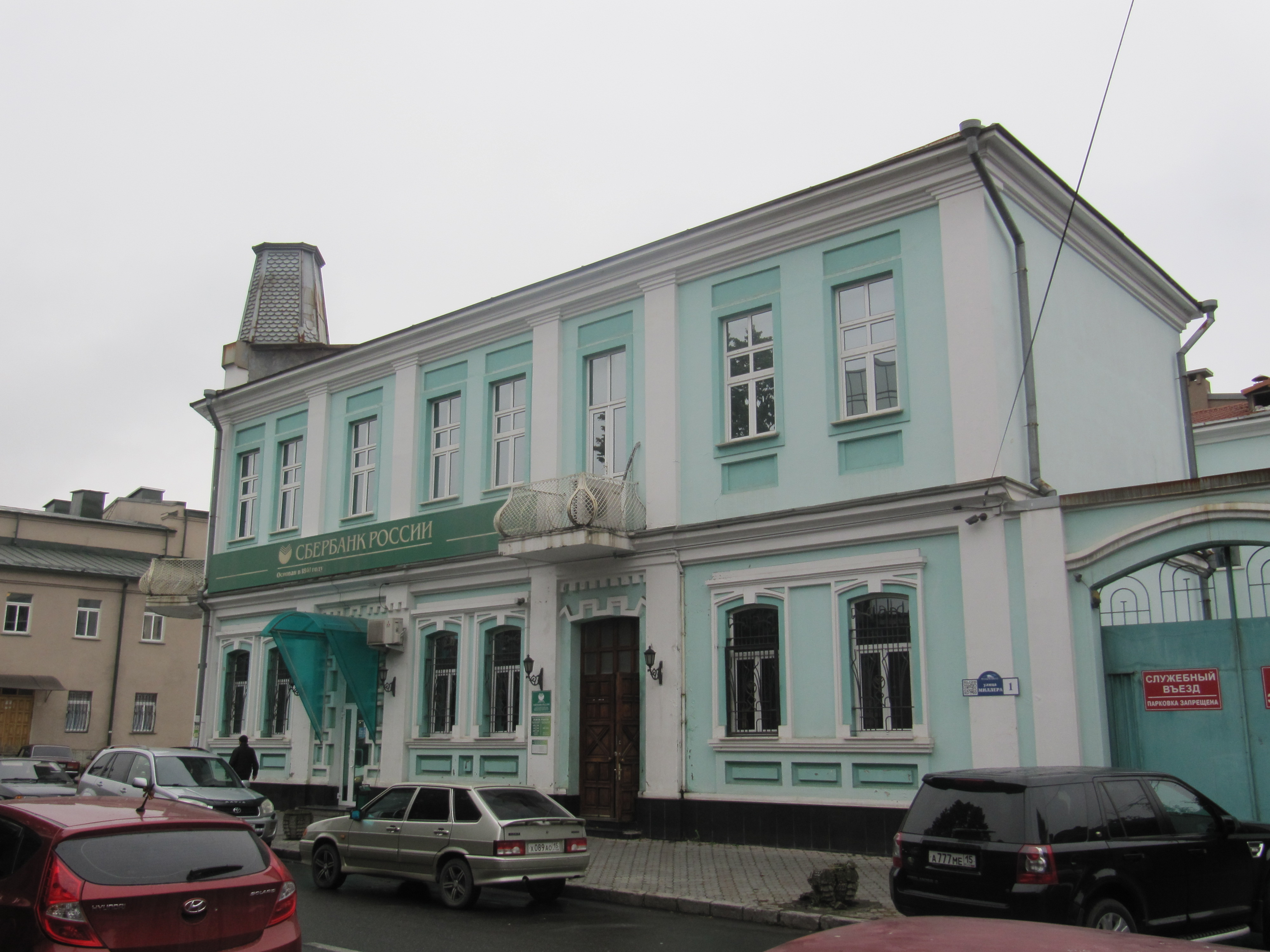 Сбербанк на улице Миллера, памятник архитектуры, Владикавказ